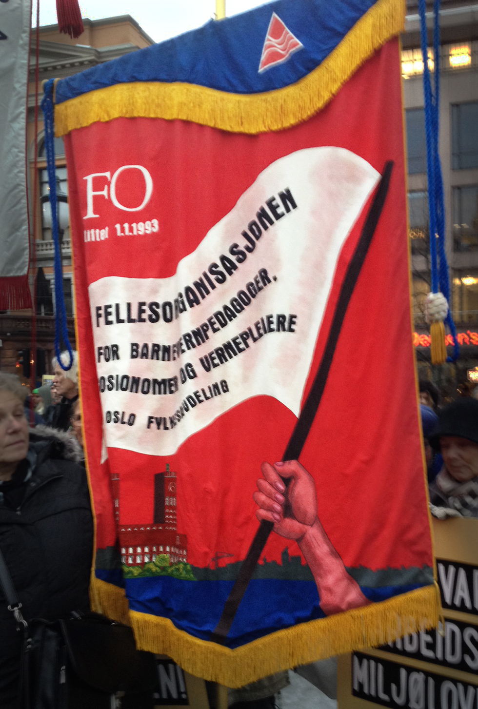 FO, Fellesorganisasjonen for barnbevernpedagoger, sosionomer og vernepleiere, fane Oslo fylkesavdeling 2015